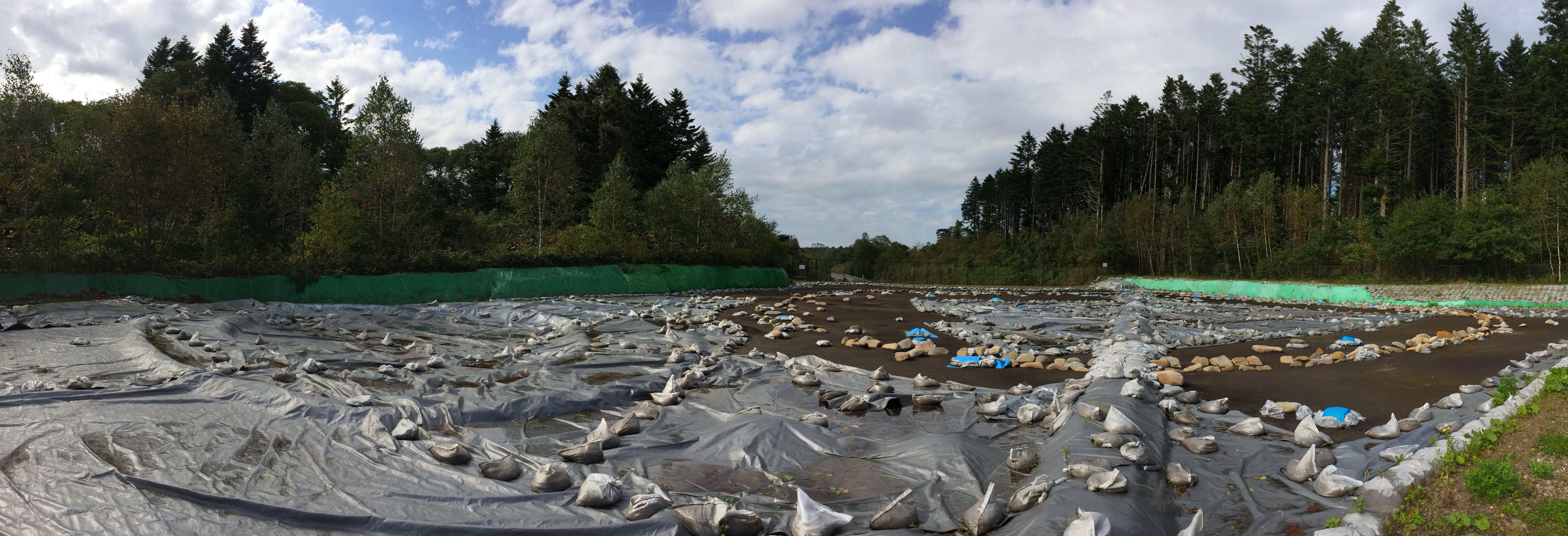 竪穴墓域から環状列石